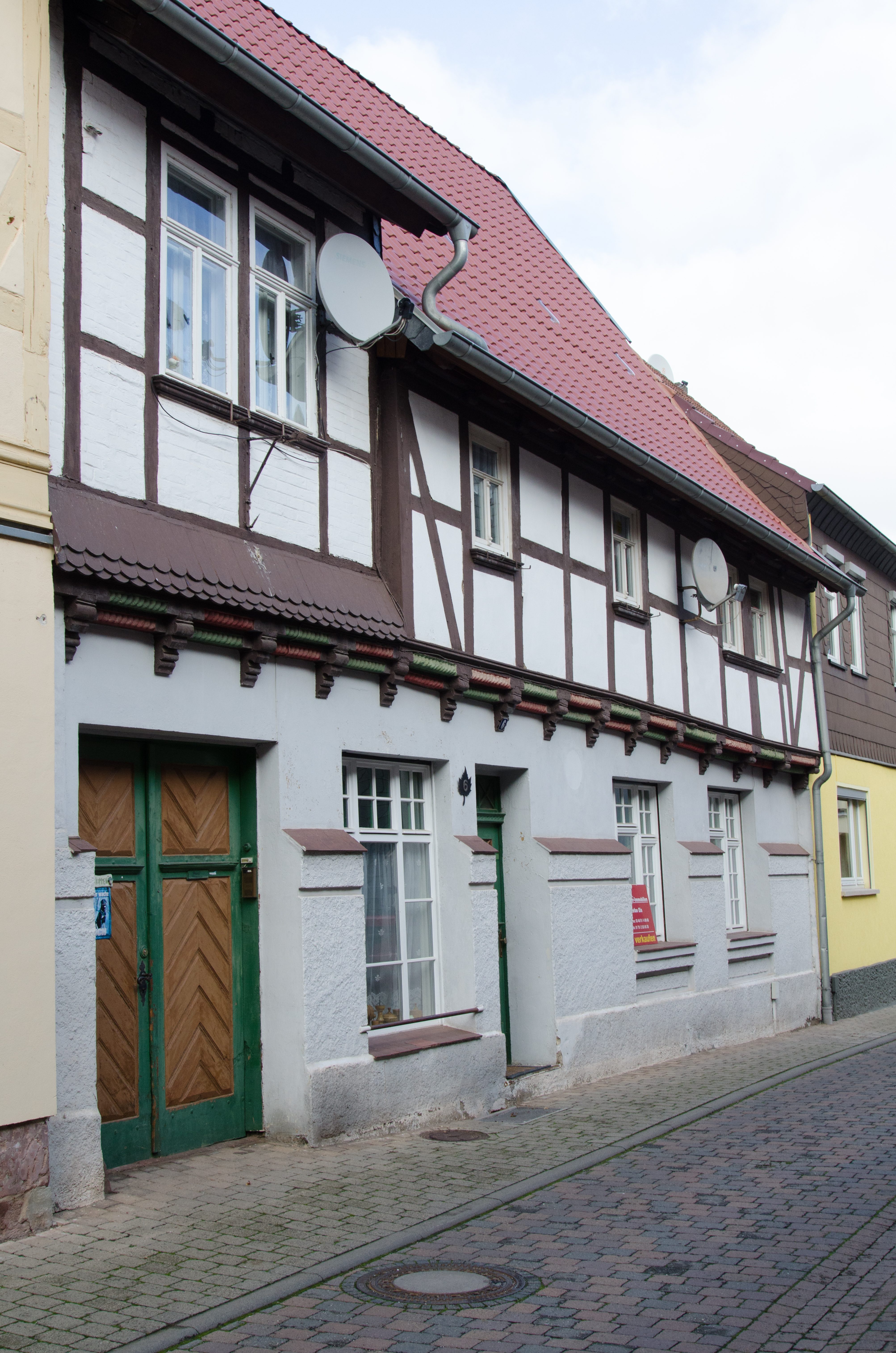 Kelbra, Mittelstraße 6